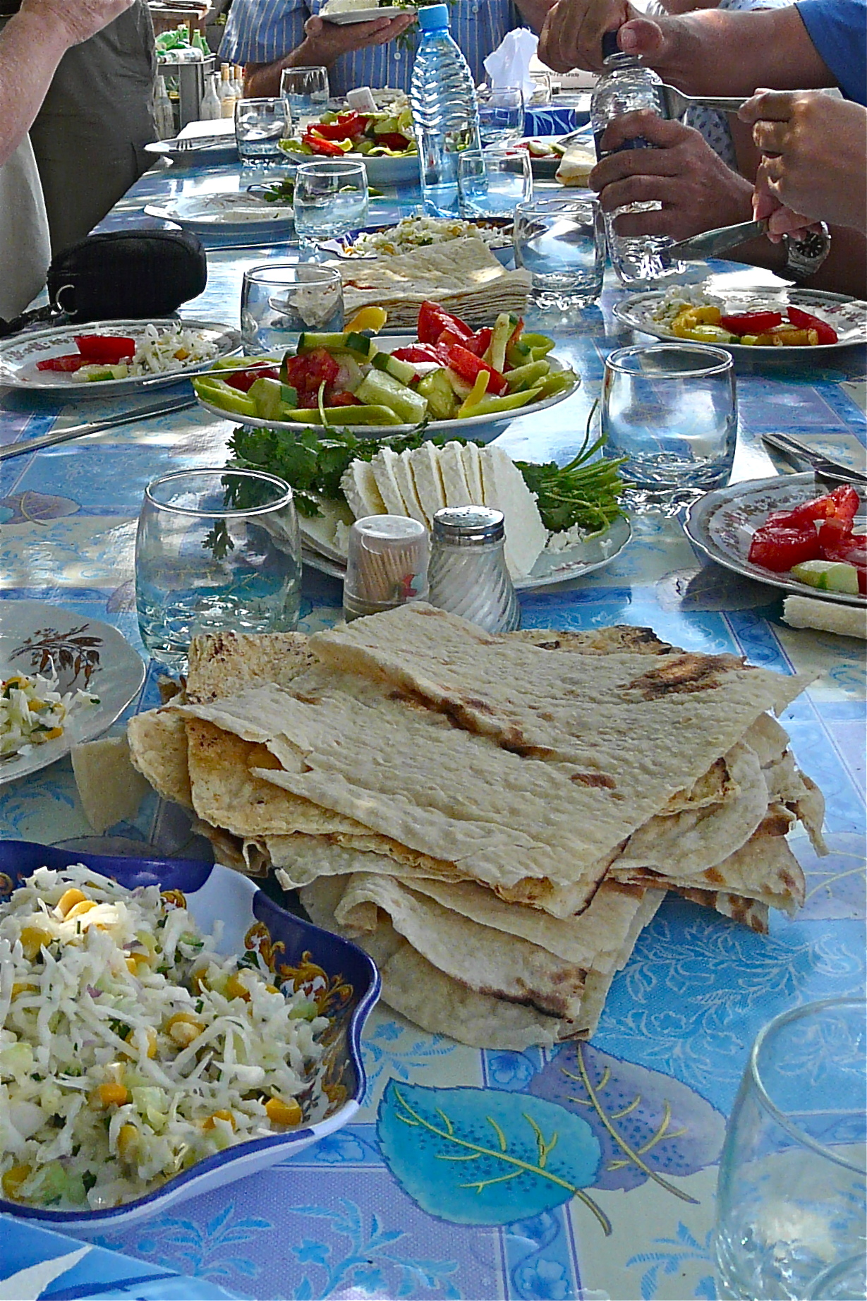 Typisch Armeense start voor een maaltijd! Heerlijke brood - pannekoeken, stukjes harde geite-of schapekaas, yoghurt, takjes dille, pijpajuin en basilicum samen met stukjes komkommer, maïs, pepers, paprika's en tomaatjes. Allerlei kleine koude mengsels van vlees en vis met mayonaise of vinaigrette. Heel lekker!